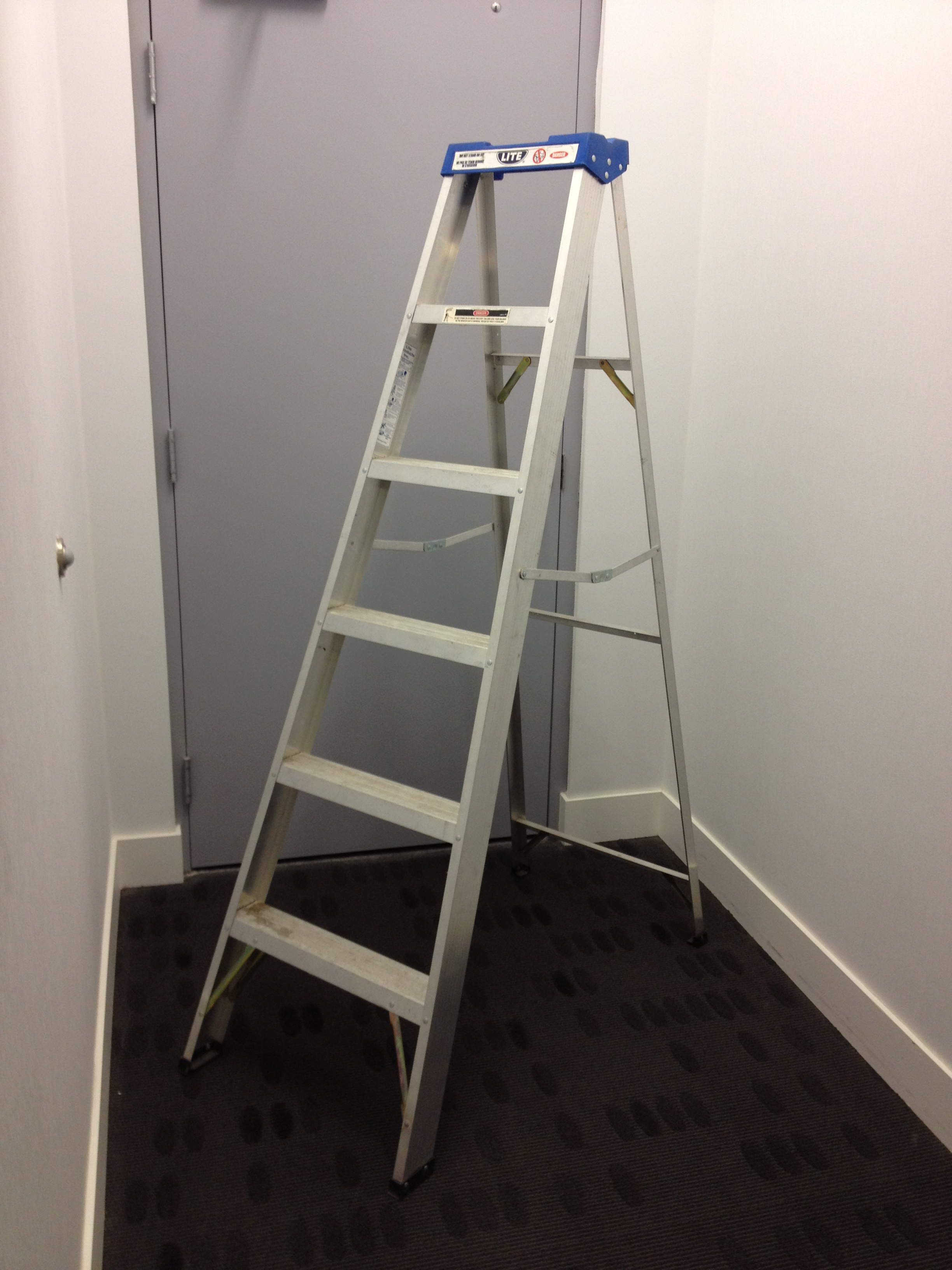 6ft ladder